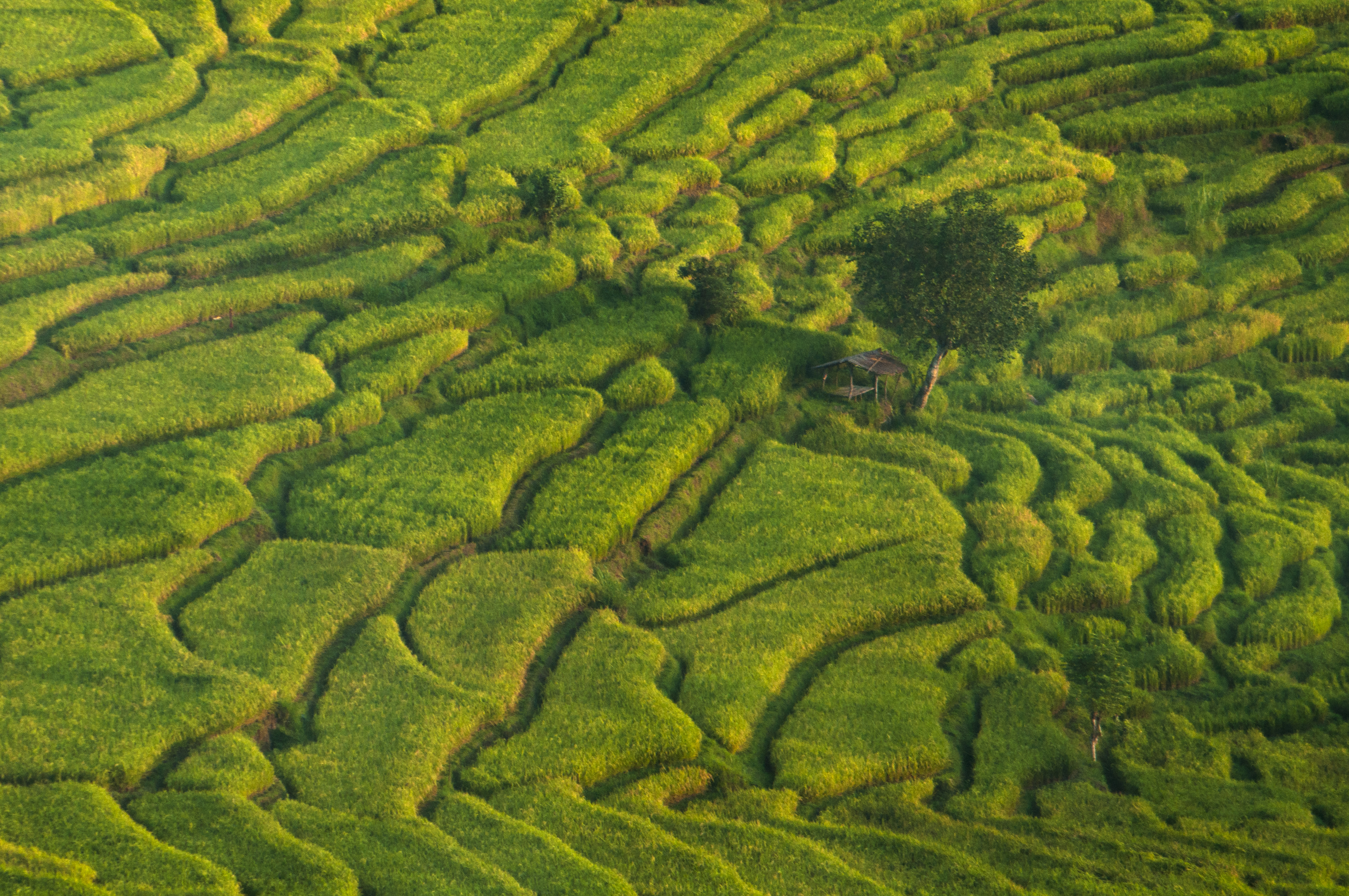 sawah merupakan areal penting dalam menunjang perekonomian masyarakat Indonesia. Karena sawah adalah penghasil kebutuhan pokok yaitu beras.